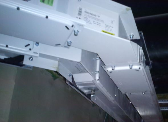 Зображення двох шинопроводів номінальним струмом 800 А кожен